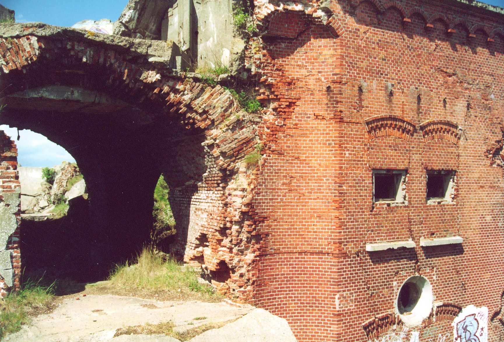 Ruine der Festung Brinkamahof II vor Weddewarden